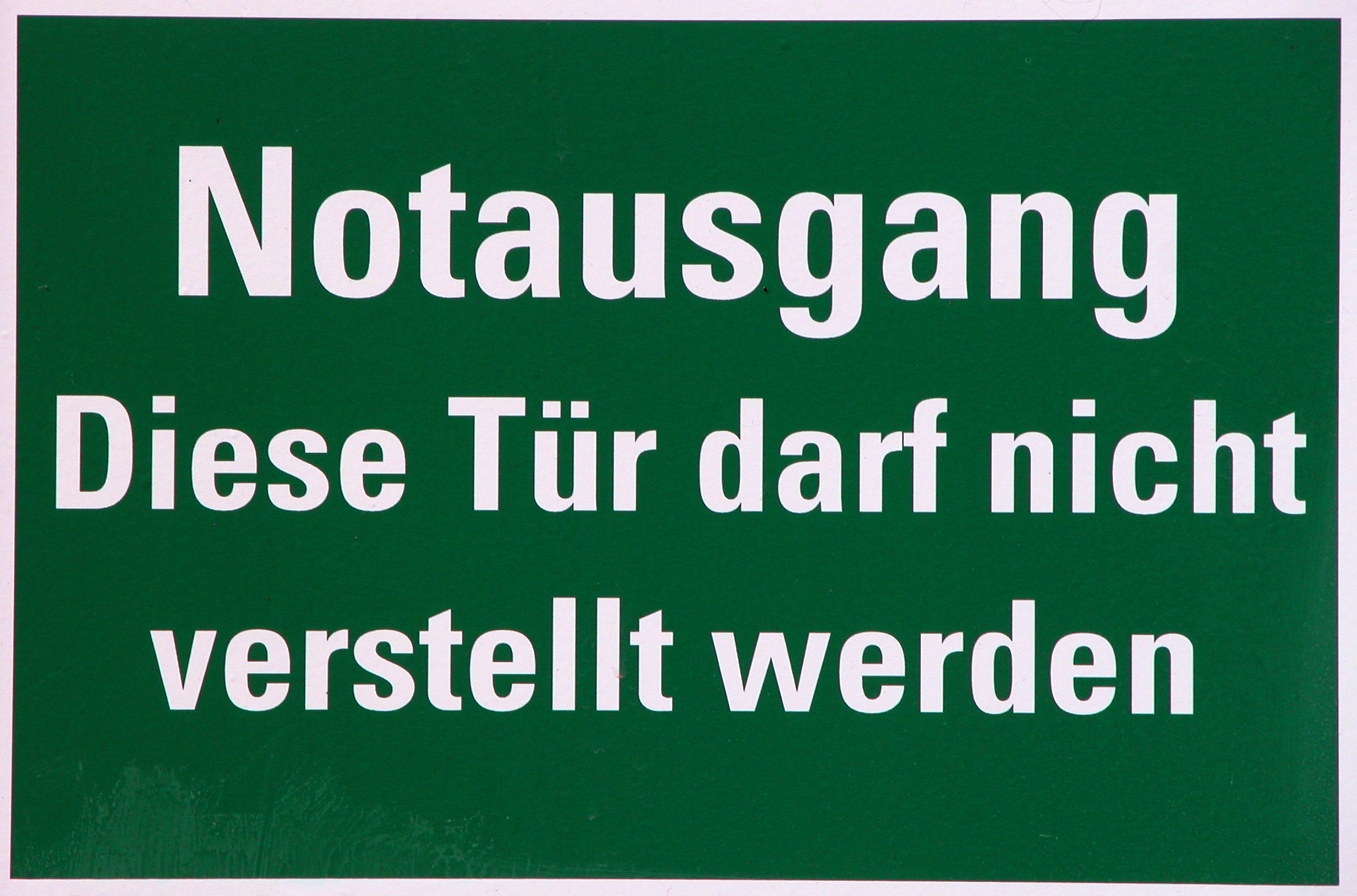 Lüneburg: Notausgangsschild. Wenn diese Tür nicht verstellt werden darf, wie komme ich dann RAUS!?!?!?!?!?